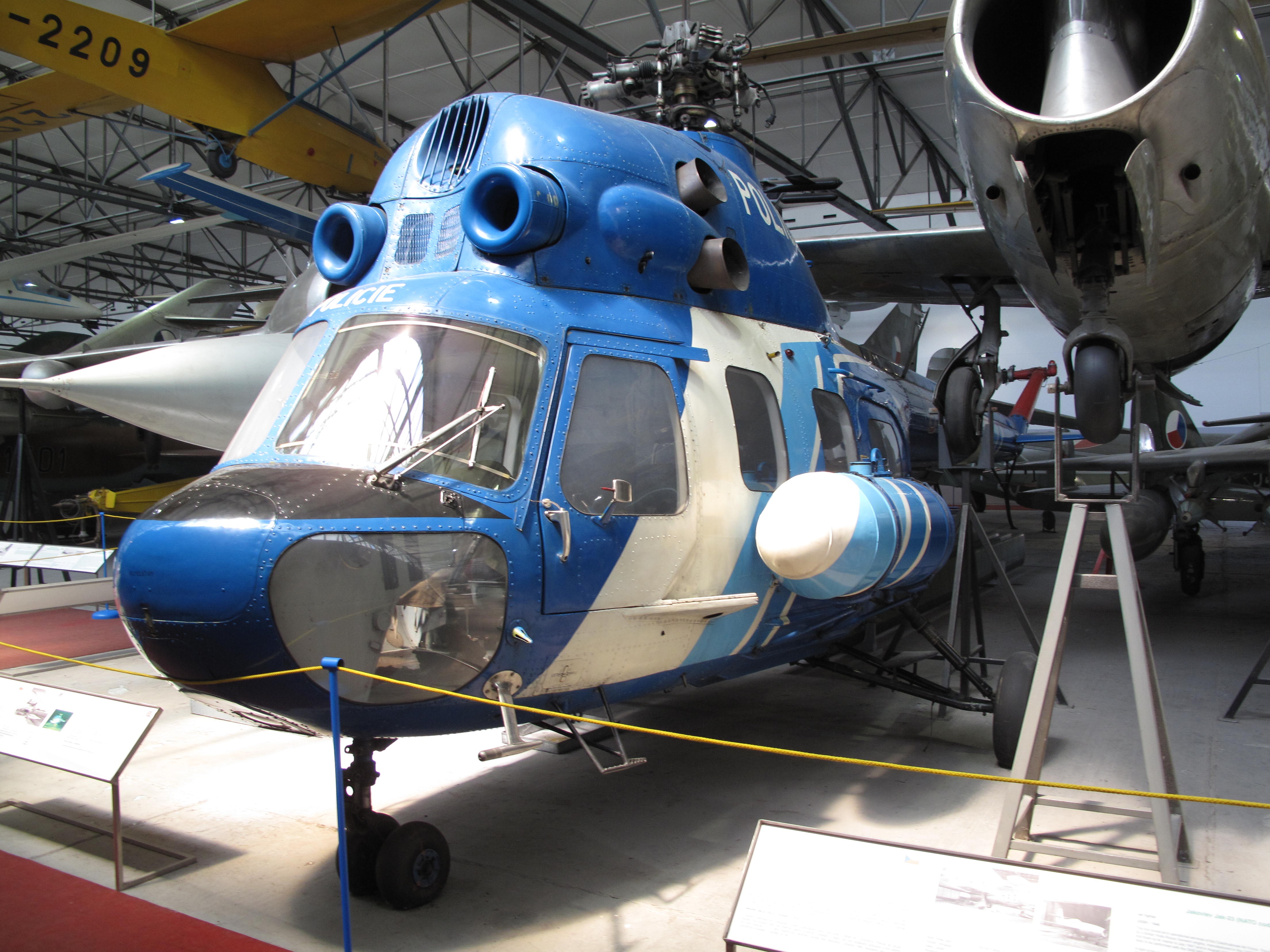 Letecké muzeum Kbely